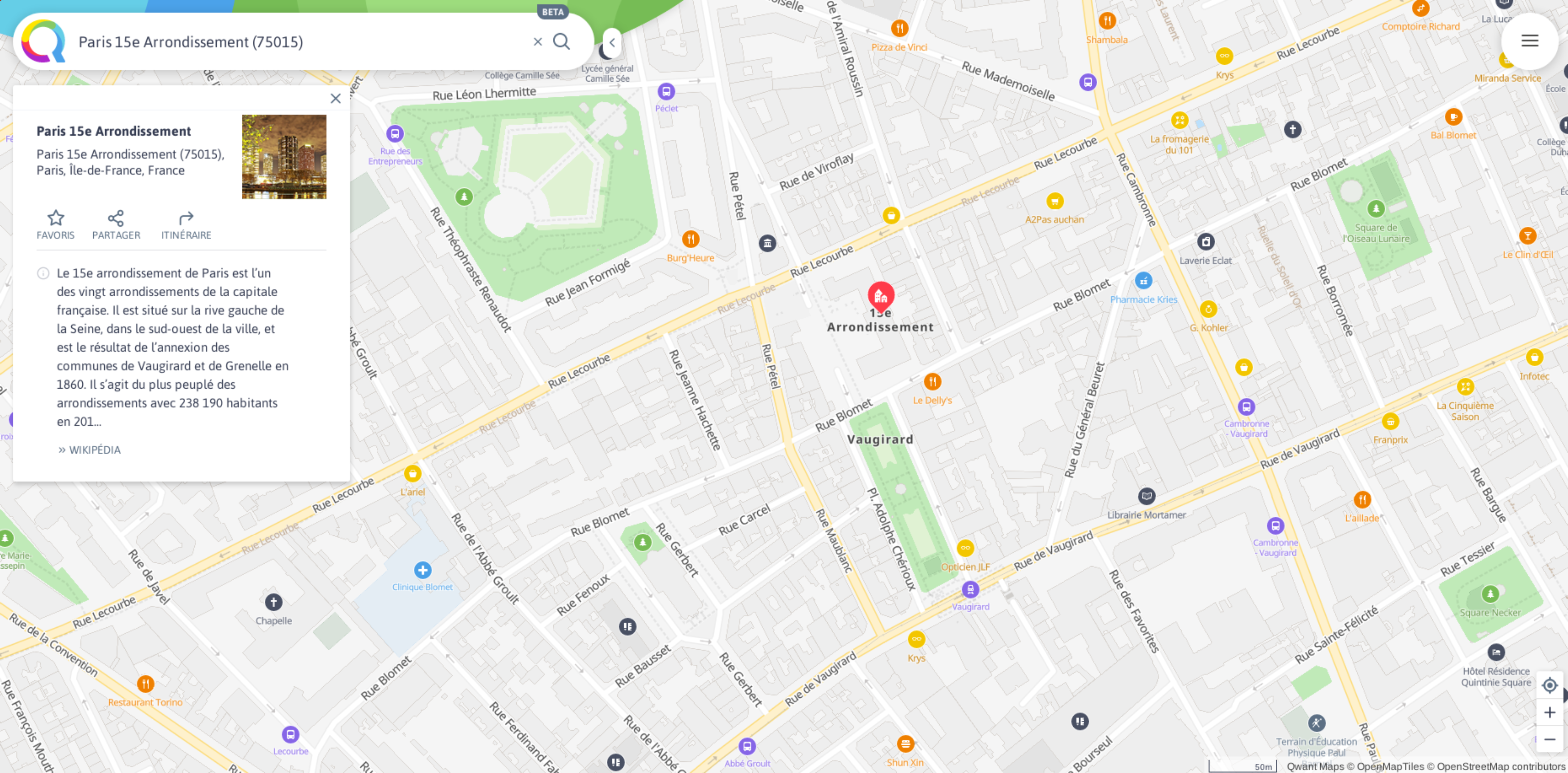 Interface de Qwant Maps